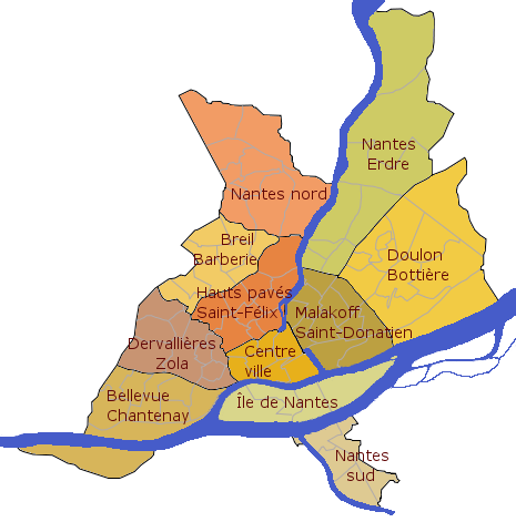 Ville de Nantes (France) - Carte des quartiers